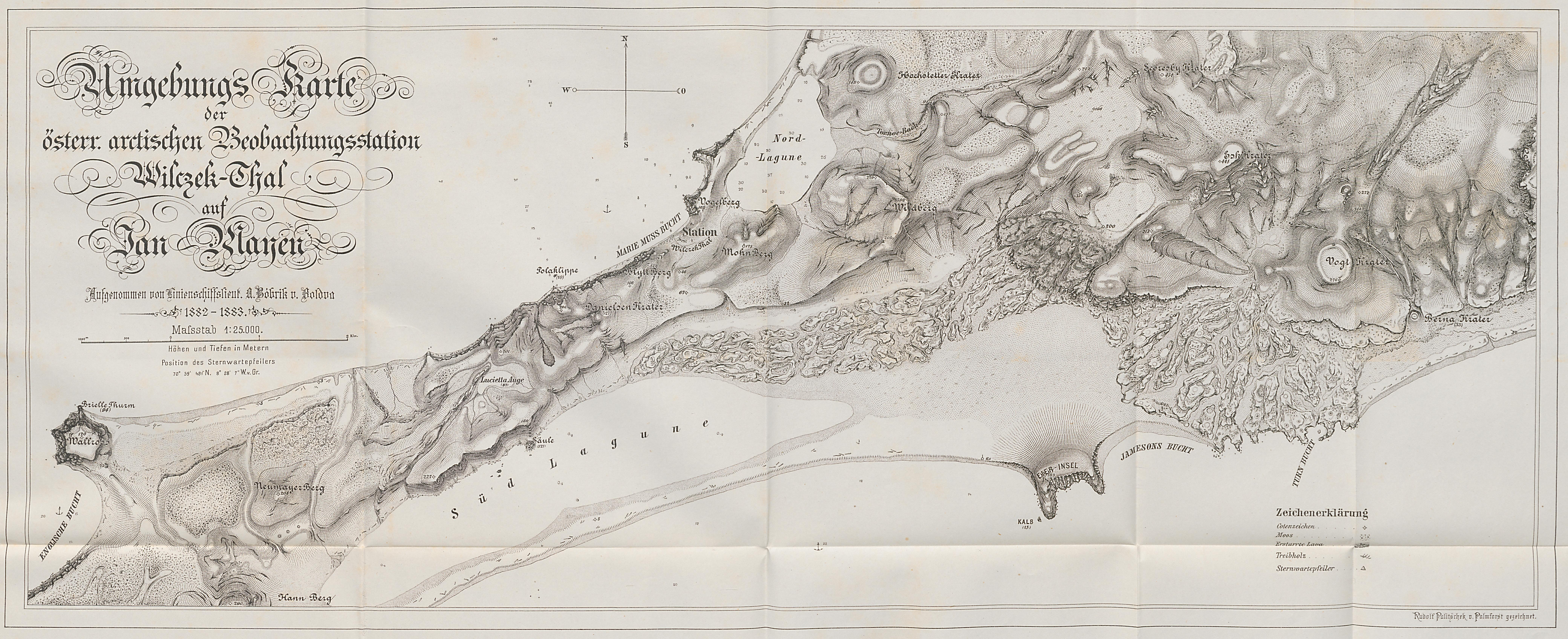 Jan Mayen (zentraler Teil) nach der Aufnahme der österreich. arct. Beobachtungsstation